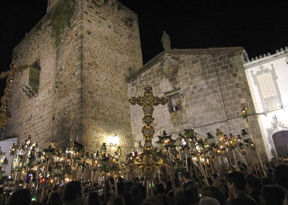 Apoteosis del Rosario del Domingo de Milagros